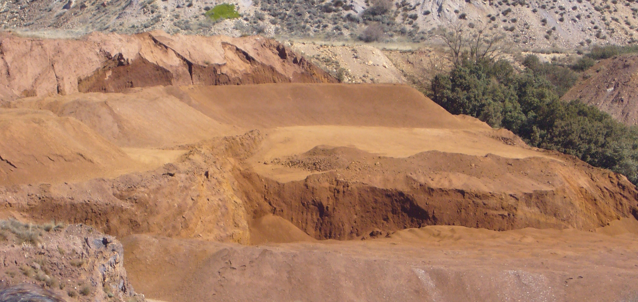 Detall extraccions ferro a les mines de Sierra Menera